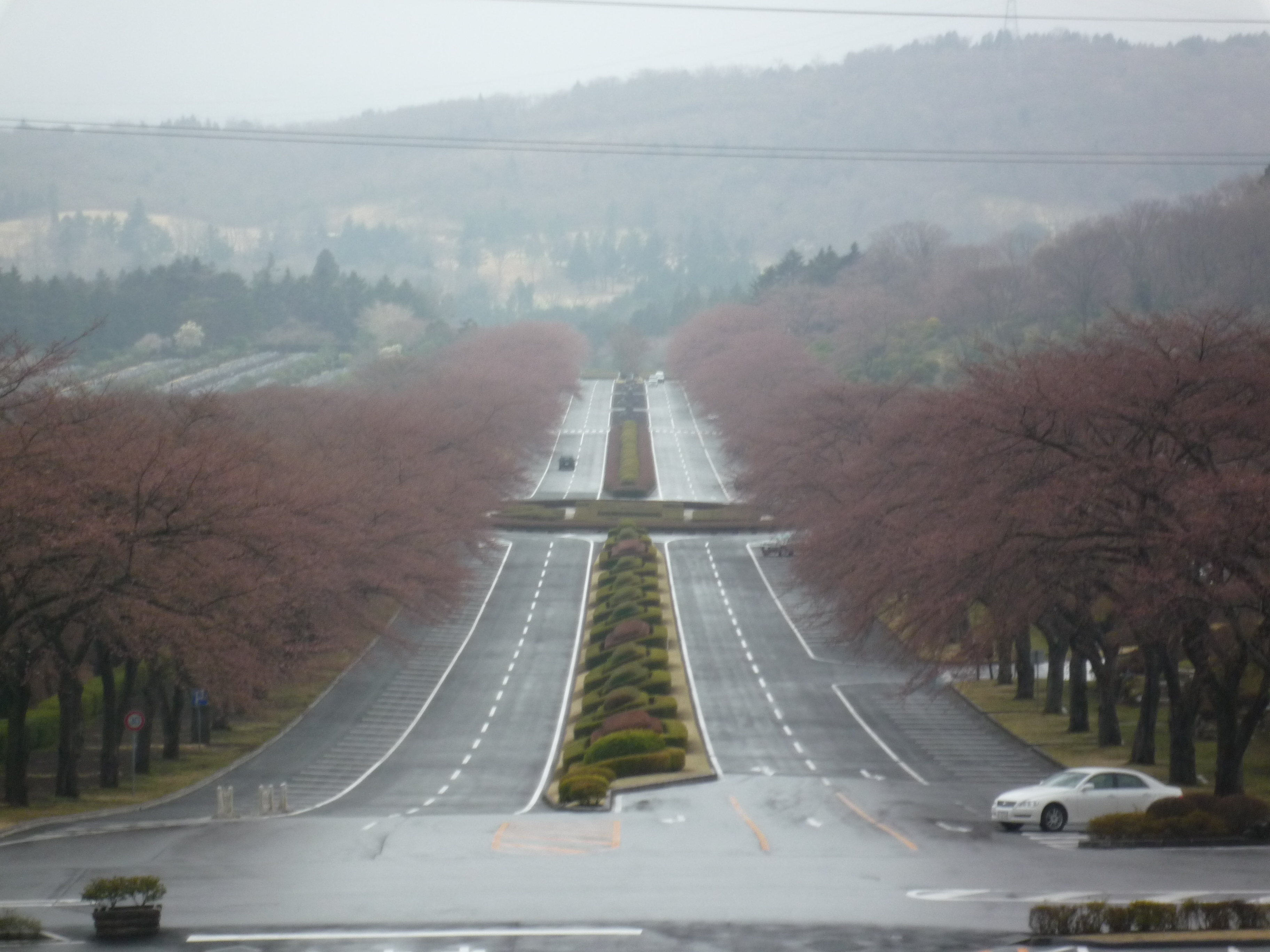 静岡県駿東郡小山町にある冨士霊園